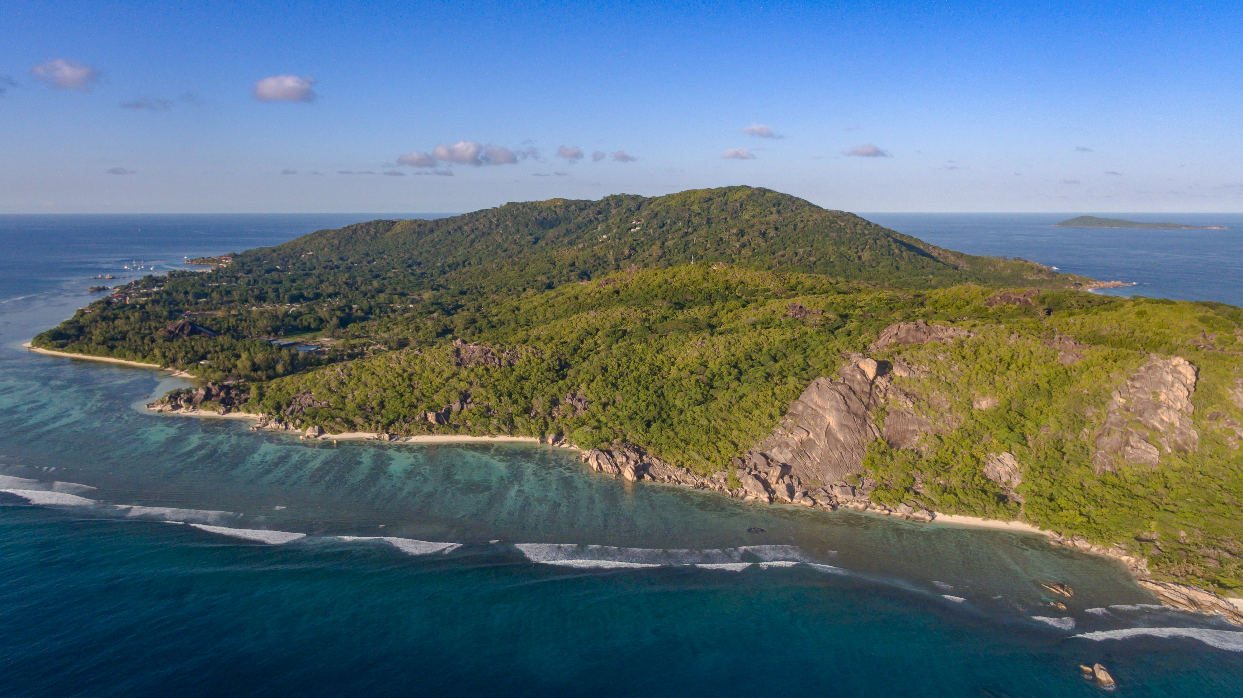 Luftbild Insel La Digue Seychellen.DNG